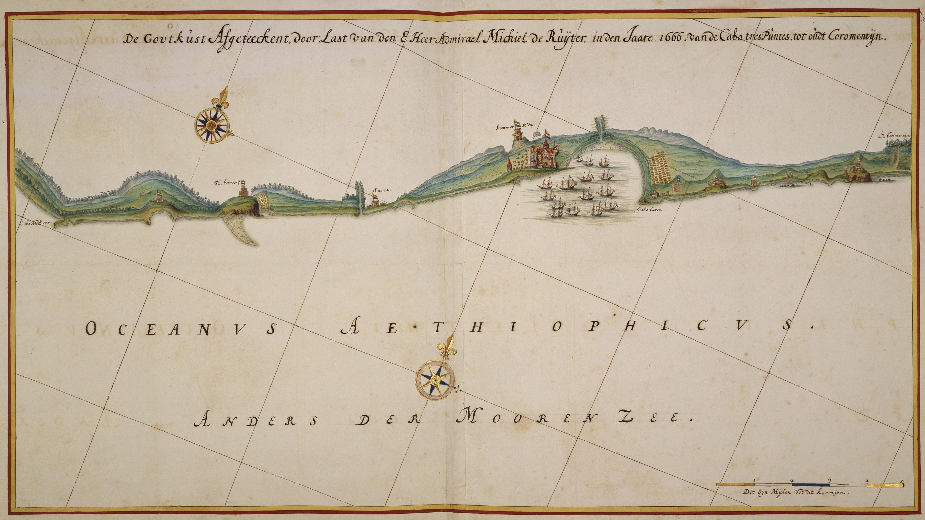 De Goutkust Afgeteeckent, door Last van den E. Heer Admirael Michiel de Ruijter, in den Jaare. 1666. van de Cabo tres Puntes, tot oudt Coromentijn